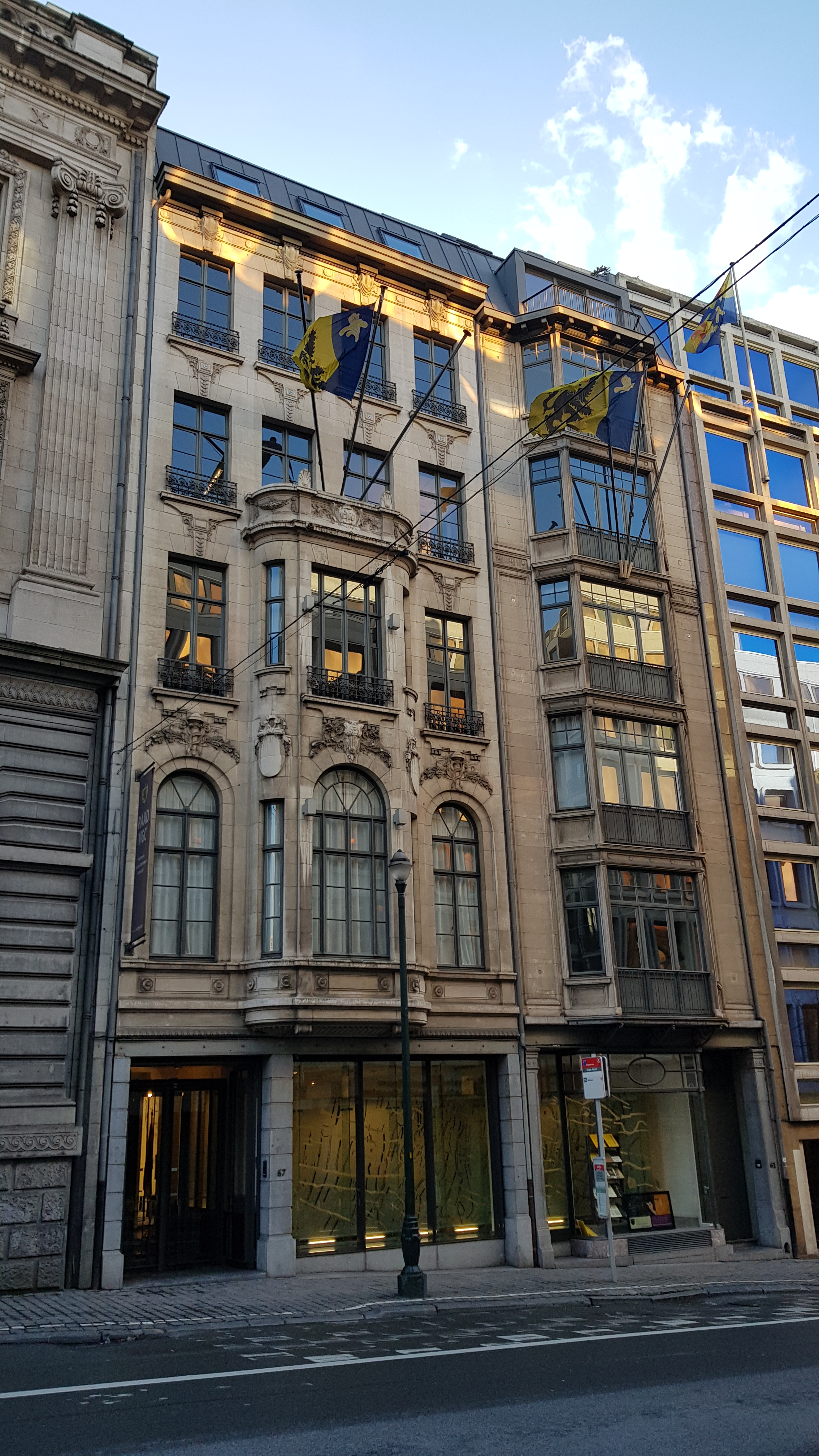 Lombardstraat 61-67, Brussel, België